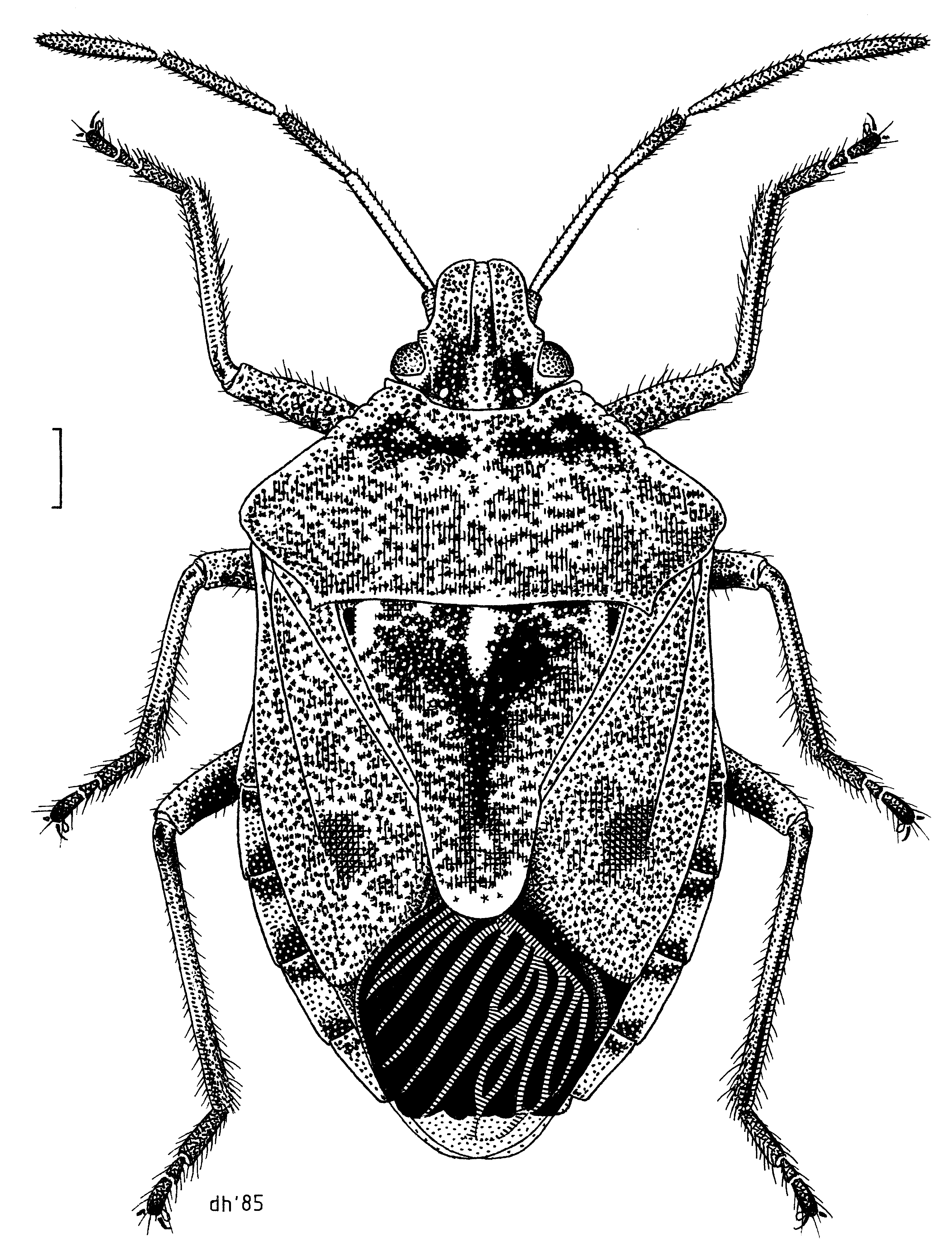 (Hemiptera: Pentatomidae) Cermatulus nasalis nasalis, female illustrated by Des Helmore.